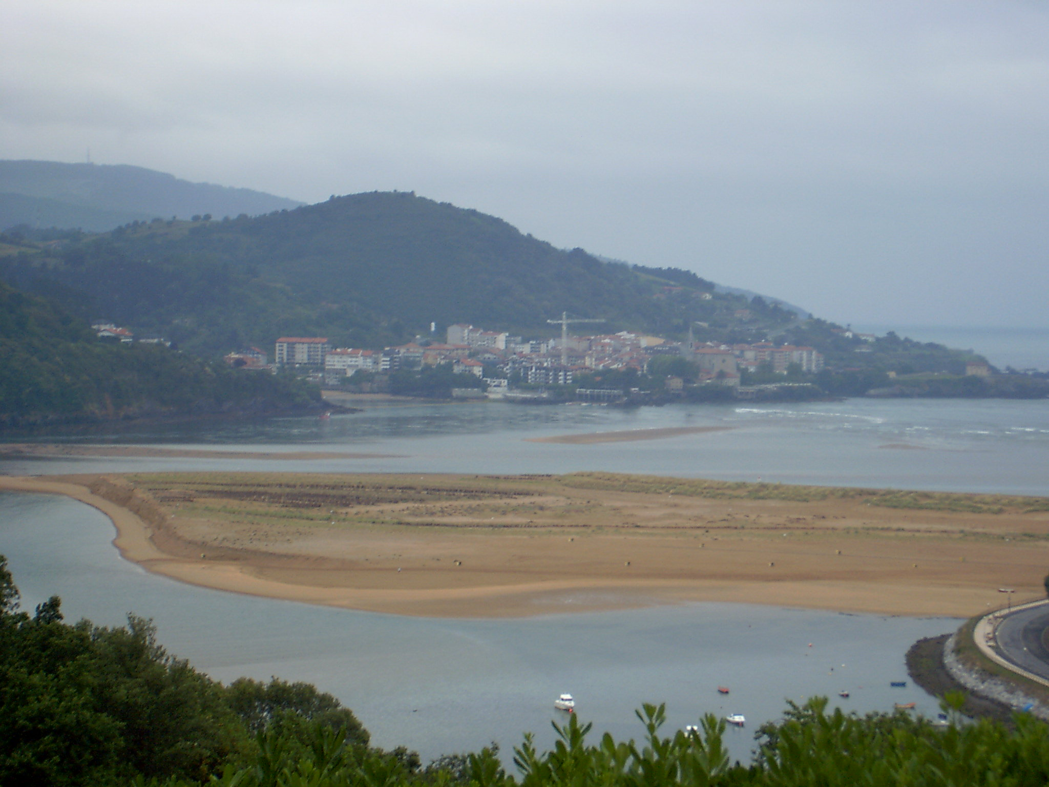 Urdaibai landscape